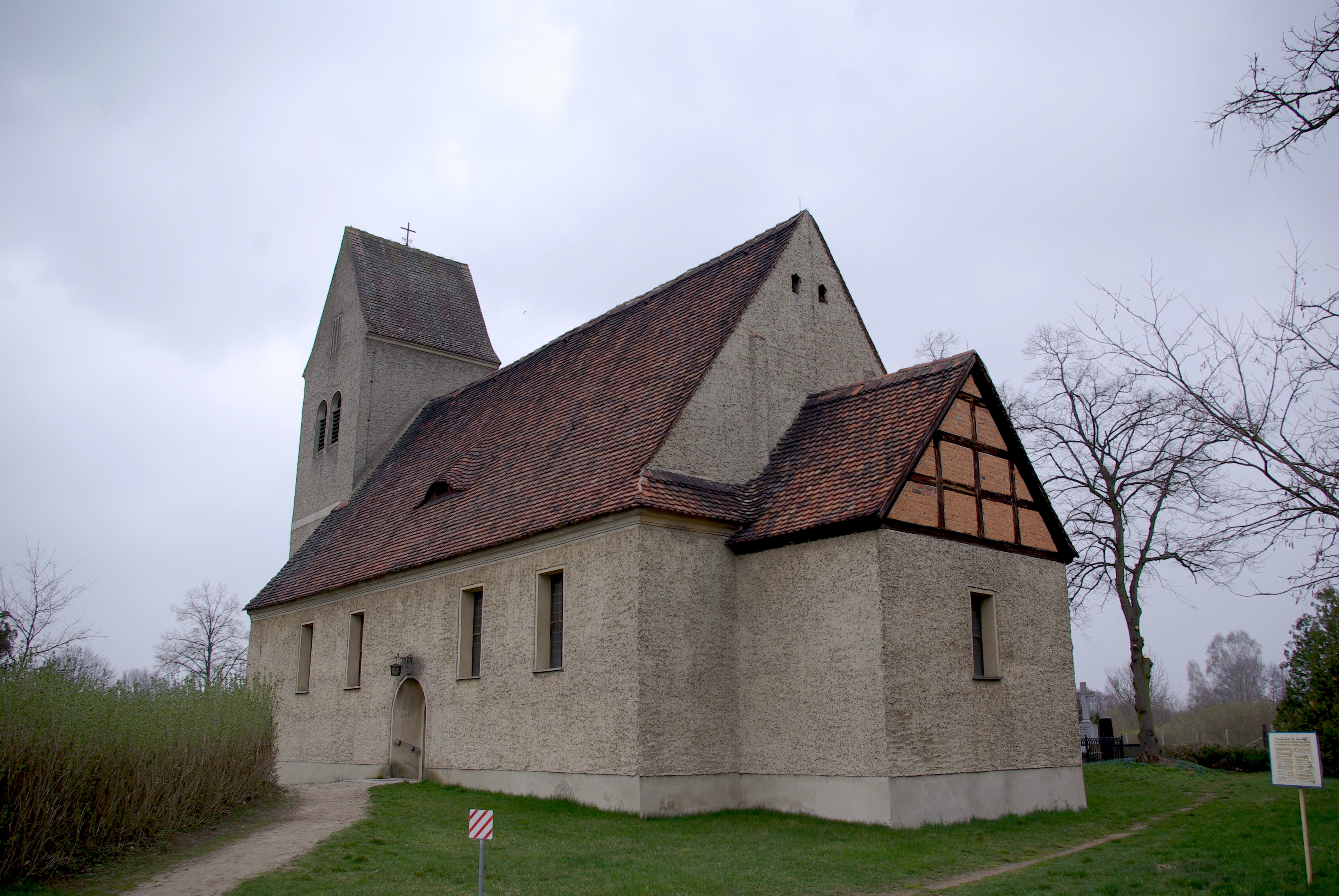 Trebbin in Brandenburg. Die Dorfkirche im Ortsteil Blankensee wurde von 1706 bis 1710 erbaut.